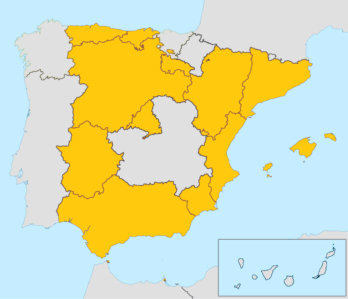 Parlamentos autonómicos en los que Ciudadanos tiene representación parlamentaria. Negro: CC.AA. sin representación parlamentaria de Ciudadanos. Amarillo: CC.AA. sin representación parlamentaria de Ciudadanos, por no haberse presentado en la elecciones anteriores. Naranja: CC.AA. con representación parlamentaria de Ciudadanos.